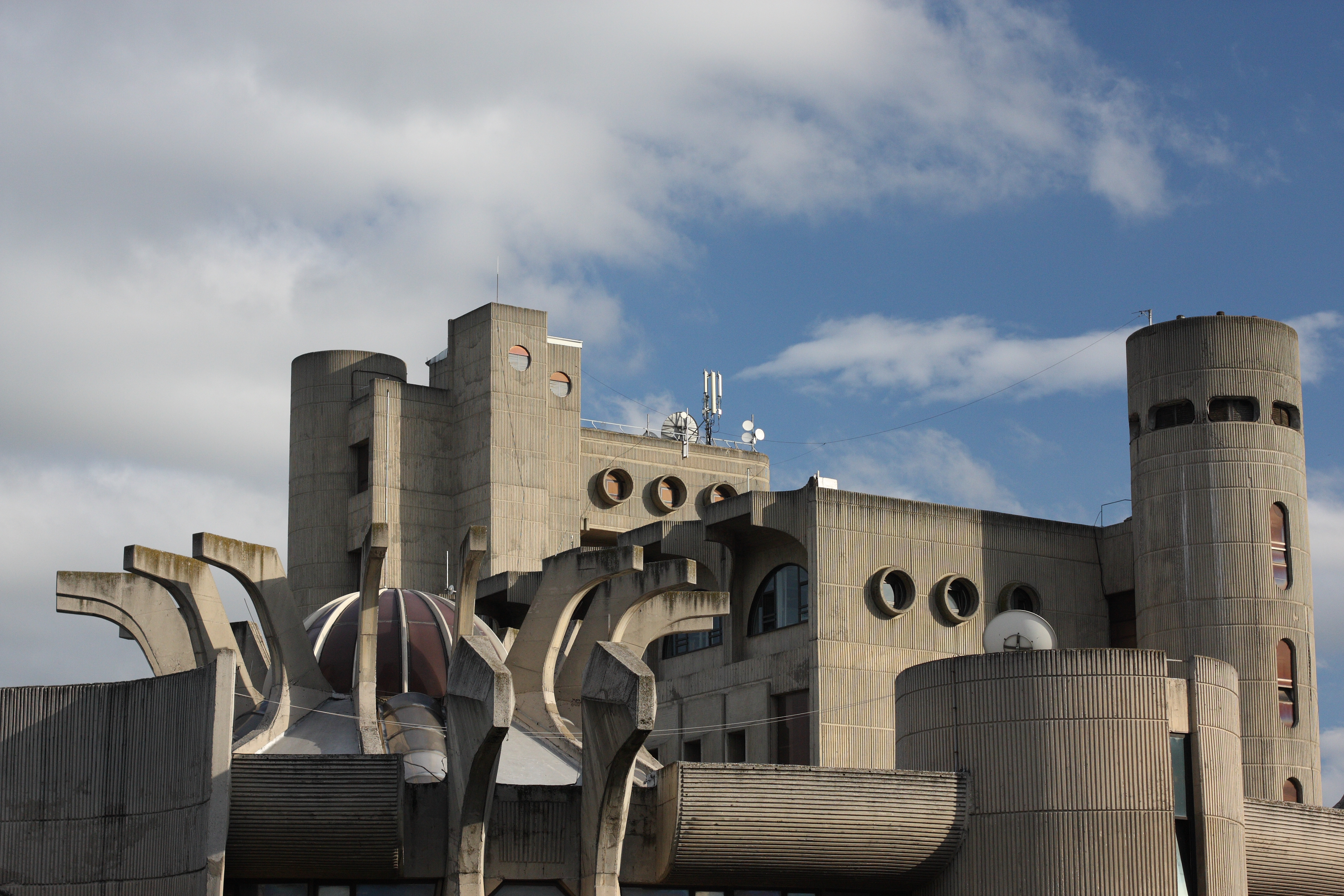 Skopjes Post